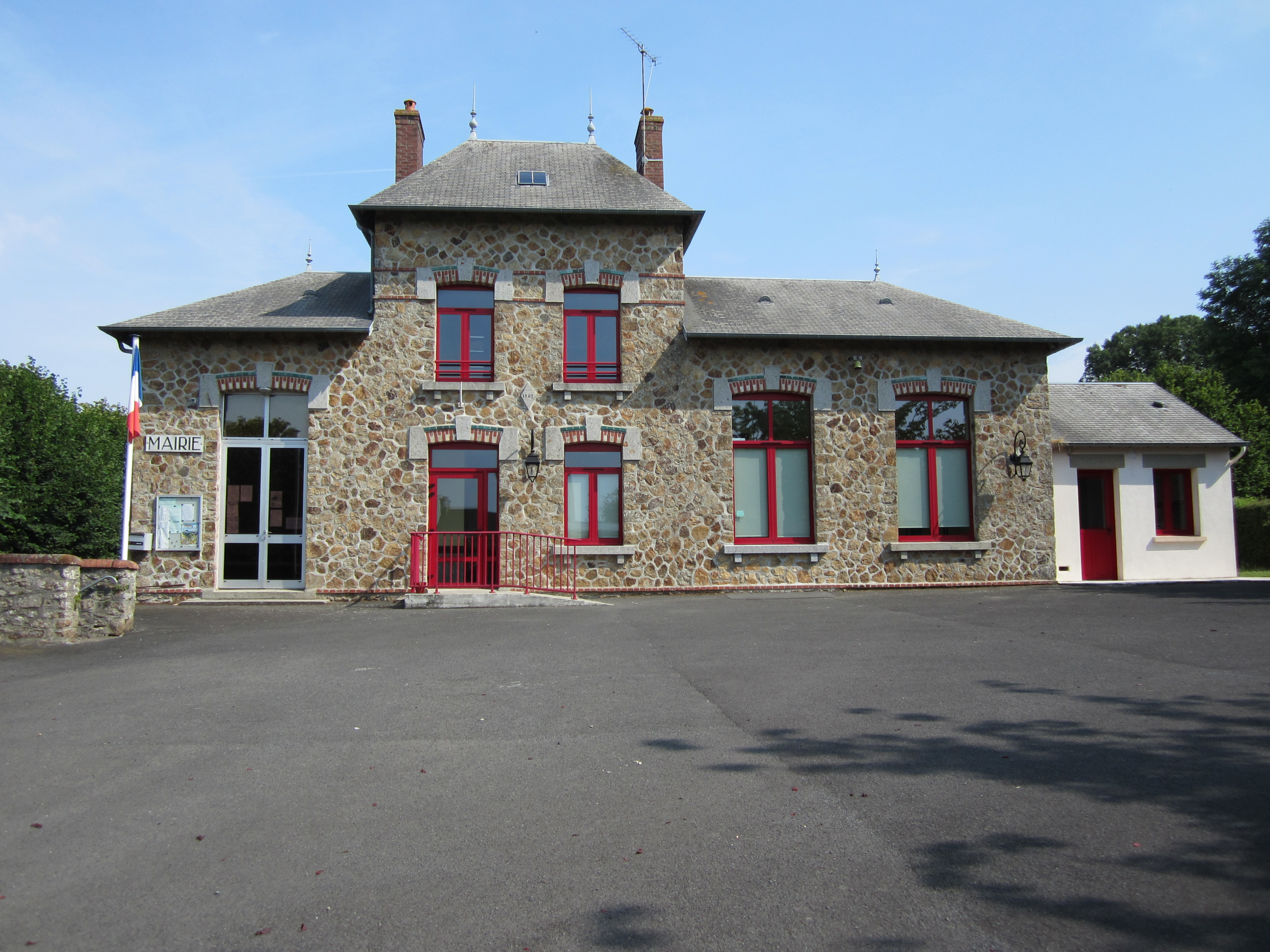 Angey